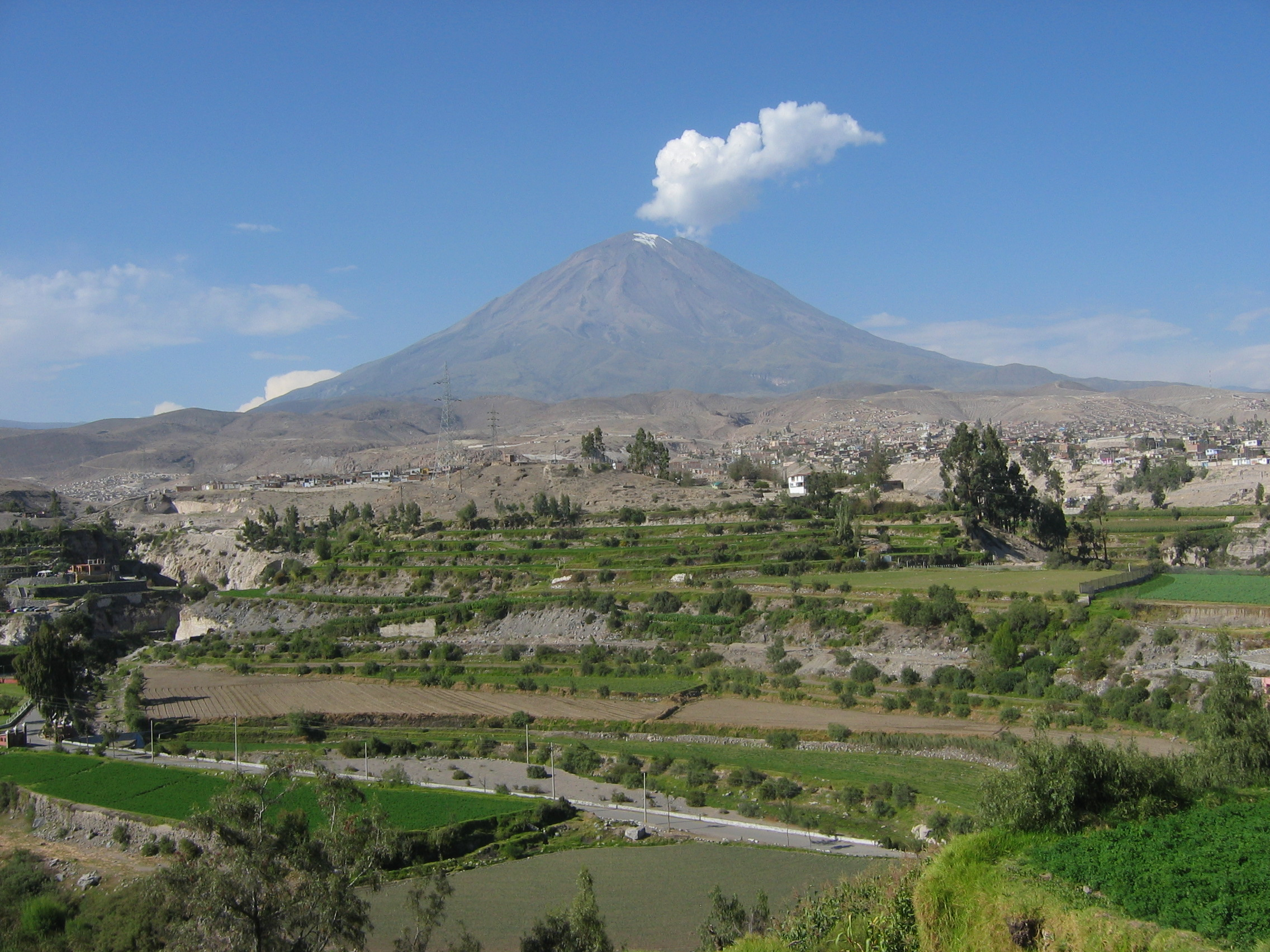 Vista del volcán misti